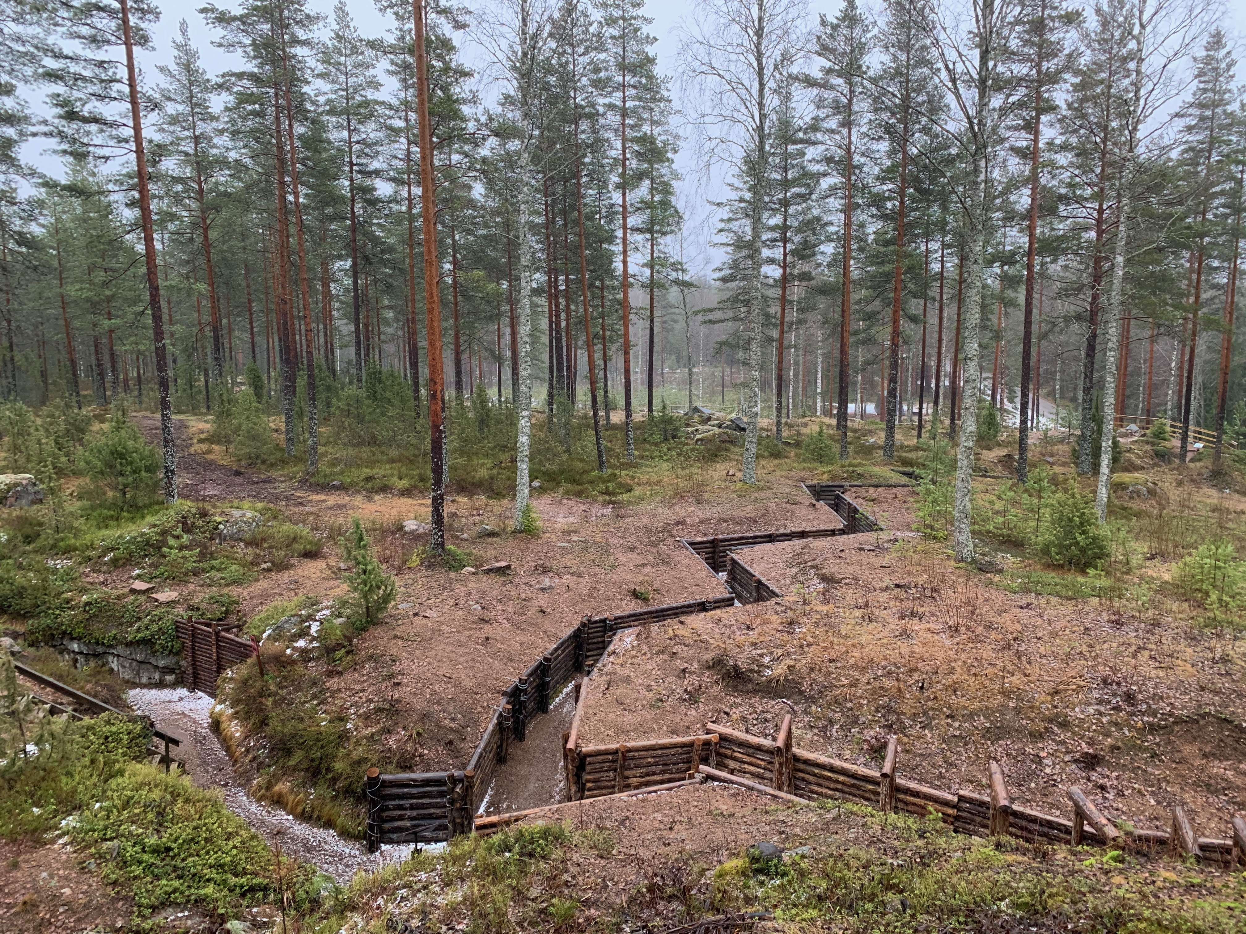 Музей линии Салпа